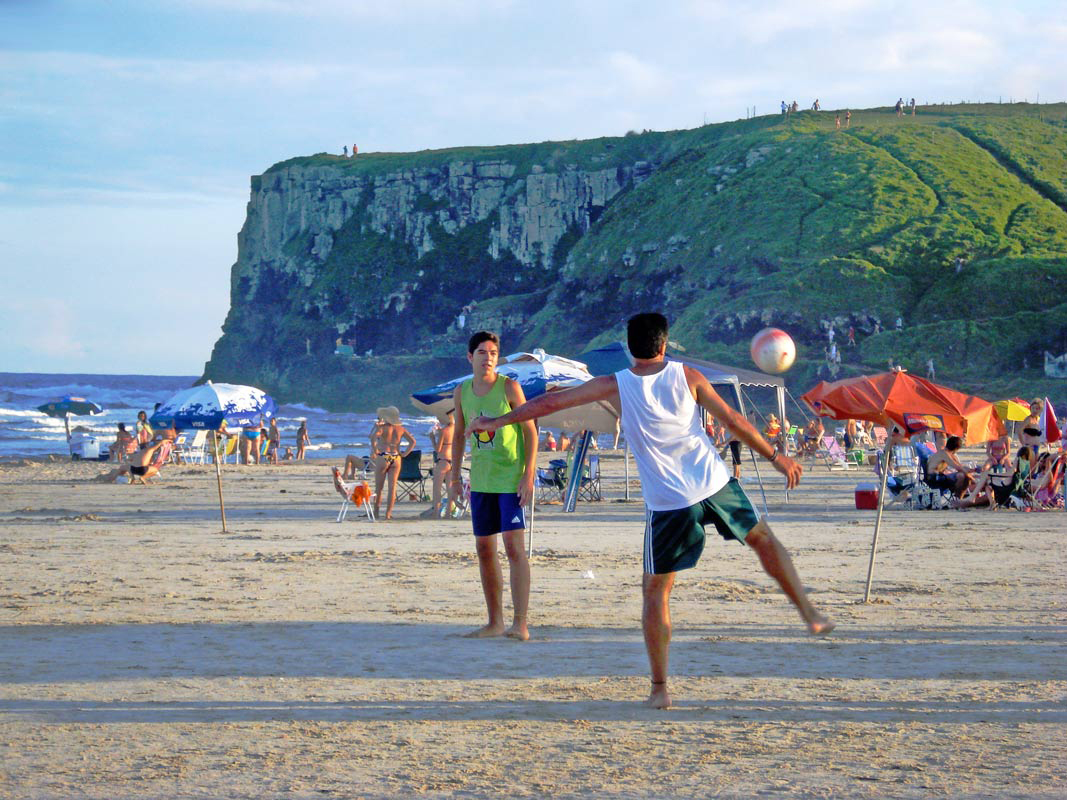 Futebol na praia da Cal